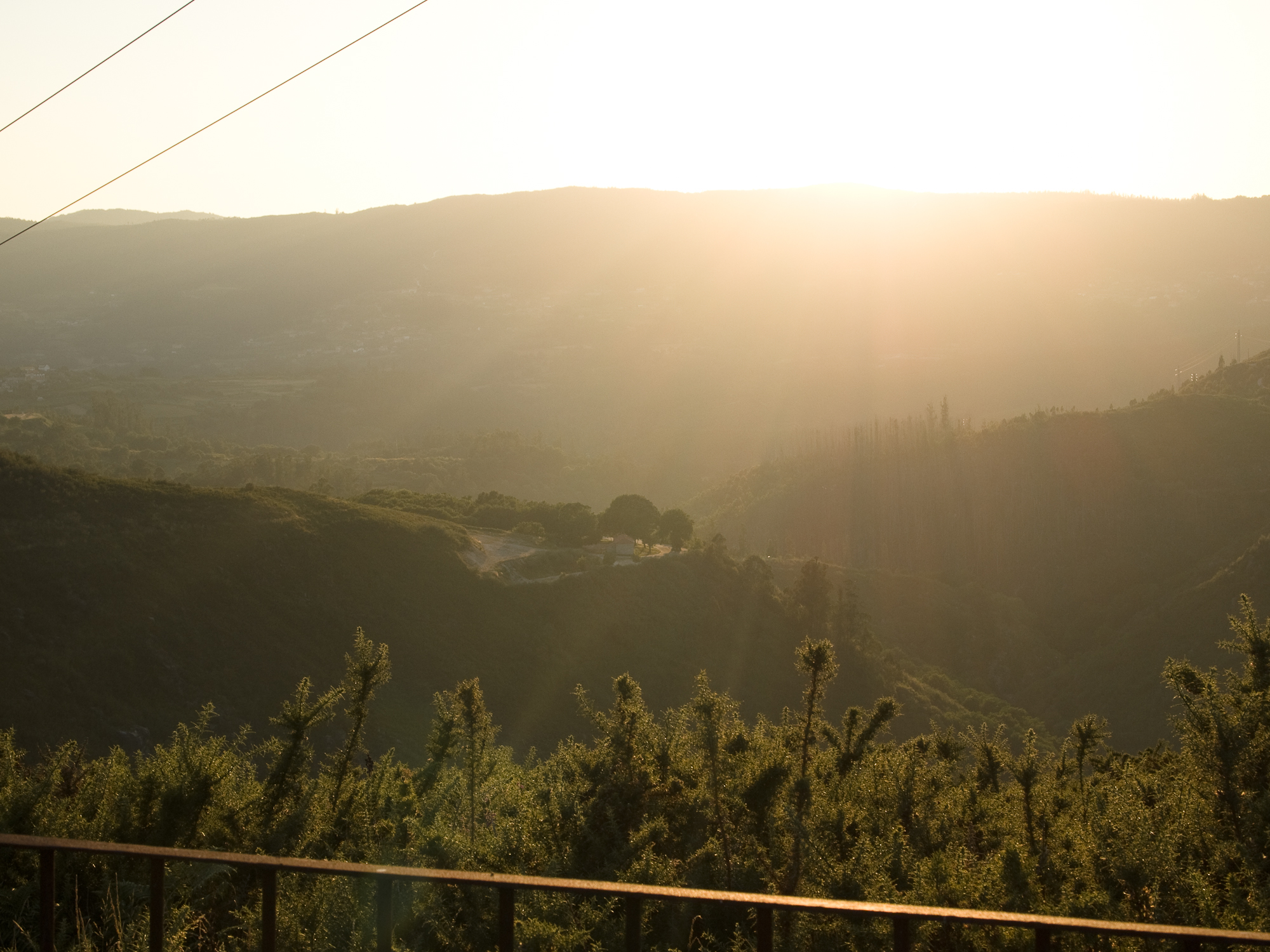 Carballeira de San Xusto - San Xurxo de Sacos - Cotobade